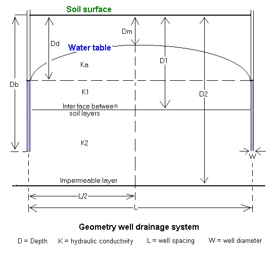 Drainage by wells